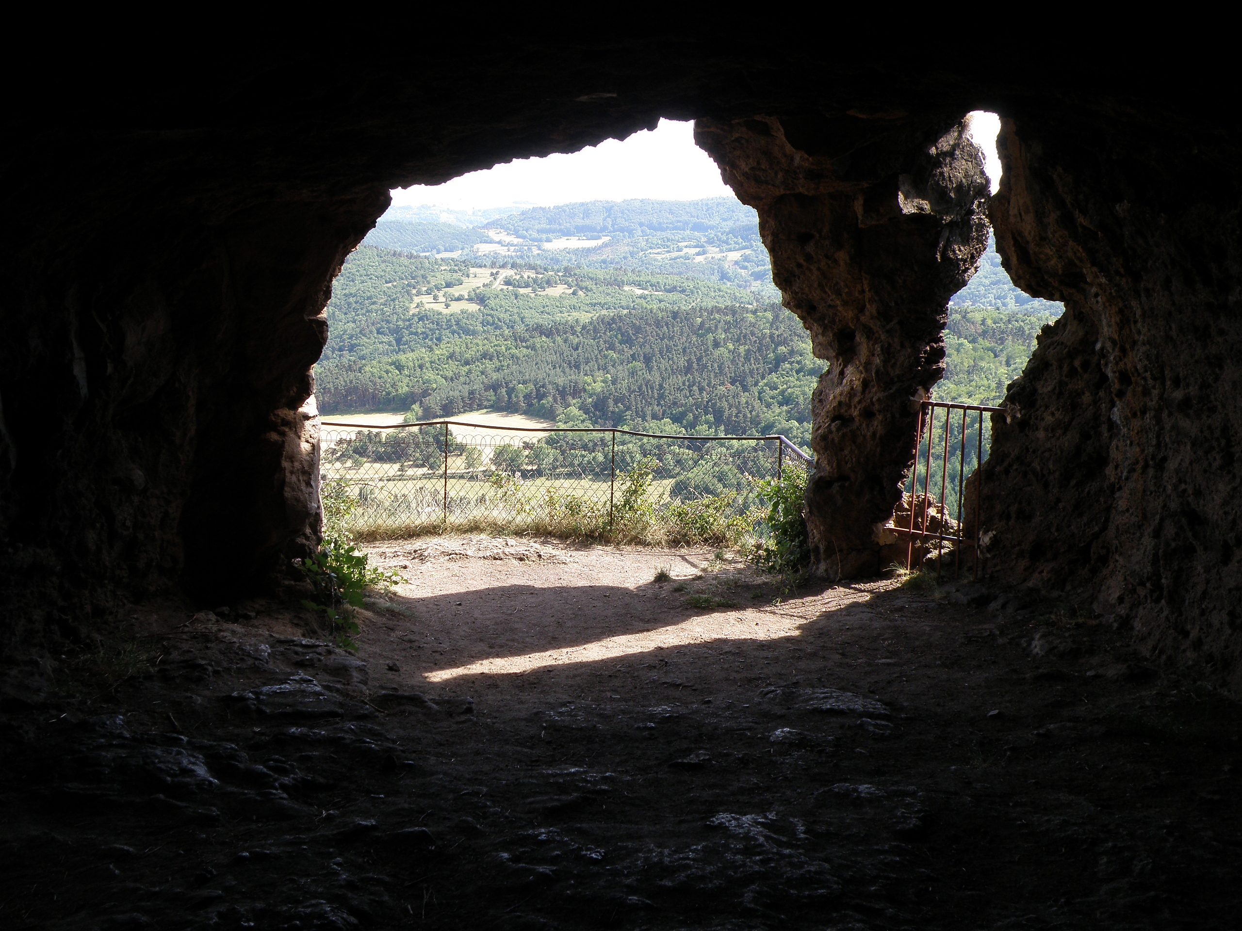 Saint-Nectaire, comm. du Puy-de-Dôme (France, région Auvergne). Grottes de Châteauneuf, sur le flanc sud-est du puy de Châteauneuf, situé non loin au nord-ouest du bourg de Saint-Nectaire.